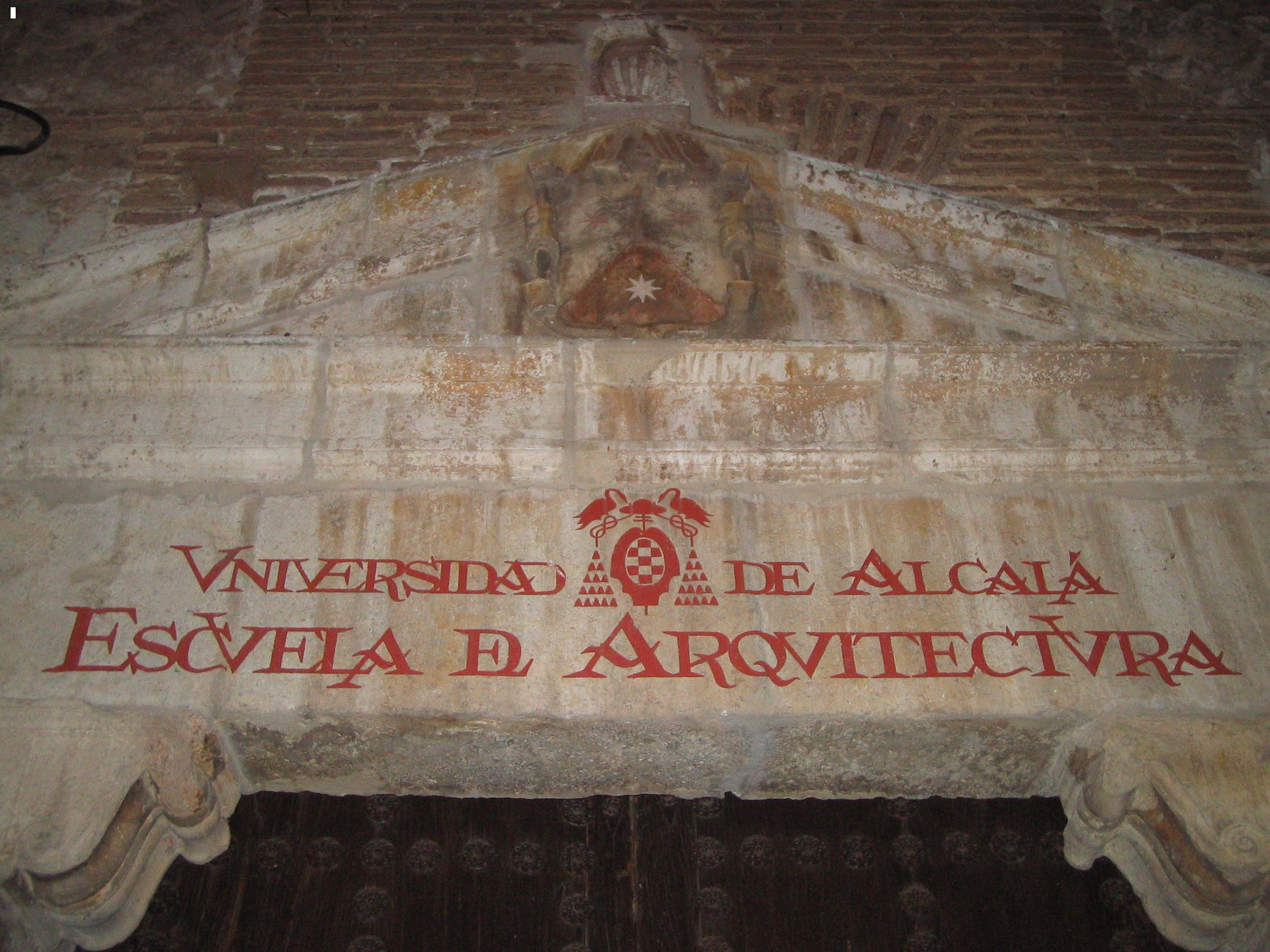 Escuela de Arquitectura de Alcalá de Henares (Spain)